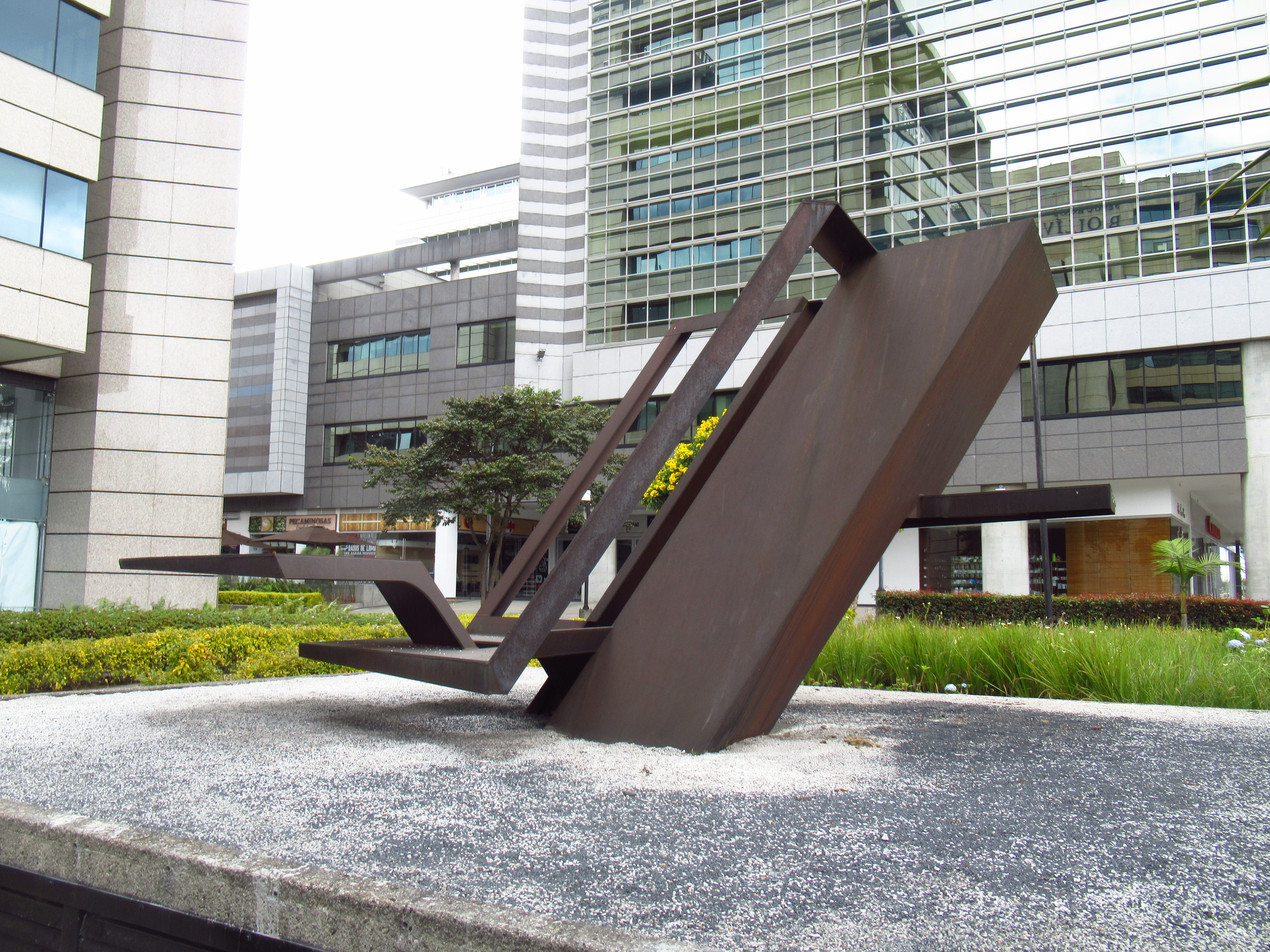 Puerta a Machu Picchu, escultura de Eduardo Ramírez Vilamizar en la avenida El Dorado